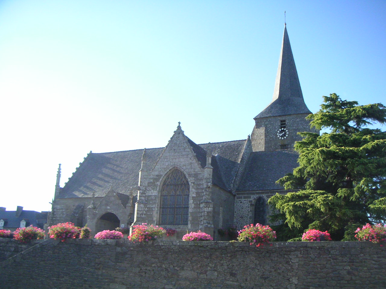 église Saint-Pierre-Saint-Firmin à Saint-Pierre-de-Plesguen Source : photo personnelle (TouN) - libre de droit Prise le : 21 juillet 2005 à 19h10